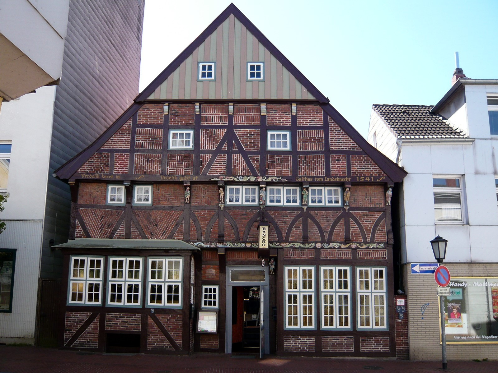 Landsknecht - das ältestes Bürgerhaus der Stadt Rendsburg. Erbaut 1541, erneuert 1951.